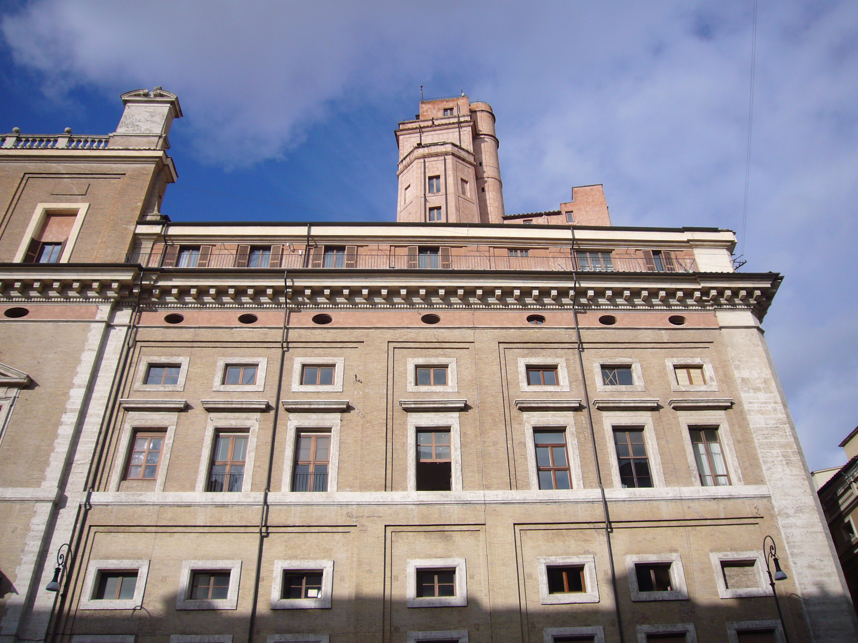 Roma, Collegio romano: torre dell'Osservatorio pontificio, detta torre Calandrelli (dal nome del canonico che ne fu nominato per primo direttore, nel 1774).